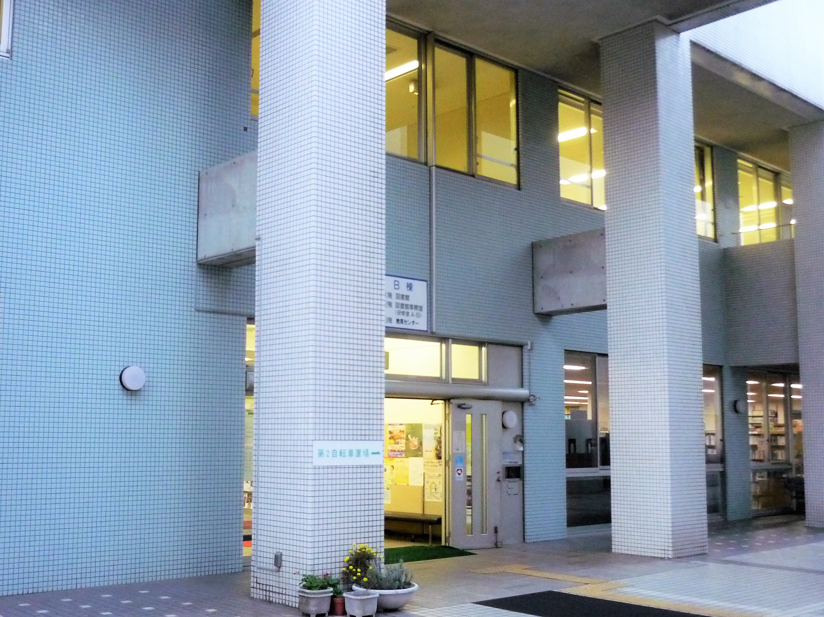 入間市立図書館 本館（産業文化センター内） Panasonic Lumix DMC-FS3